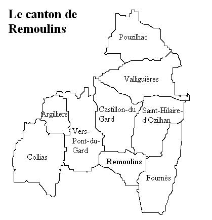 Le canton de Remoulins Image personnelle